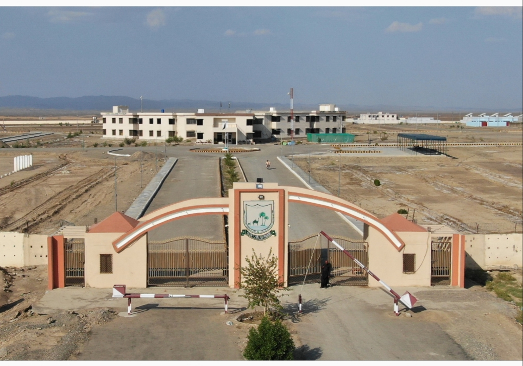 کیڈٹ کالج پنجگور